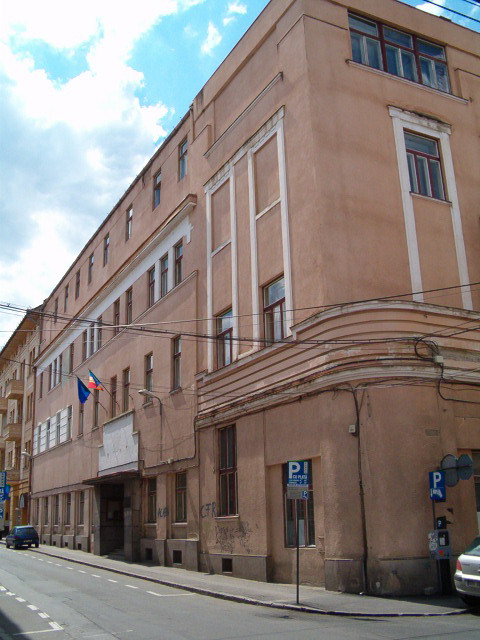 Kolozsvar Gheorghe Dima Zeneakademia